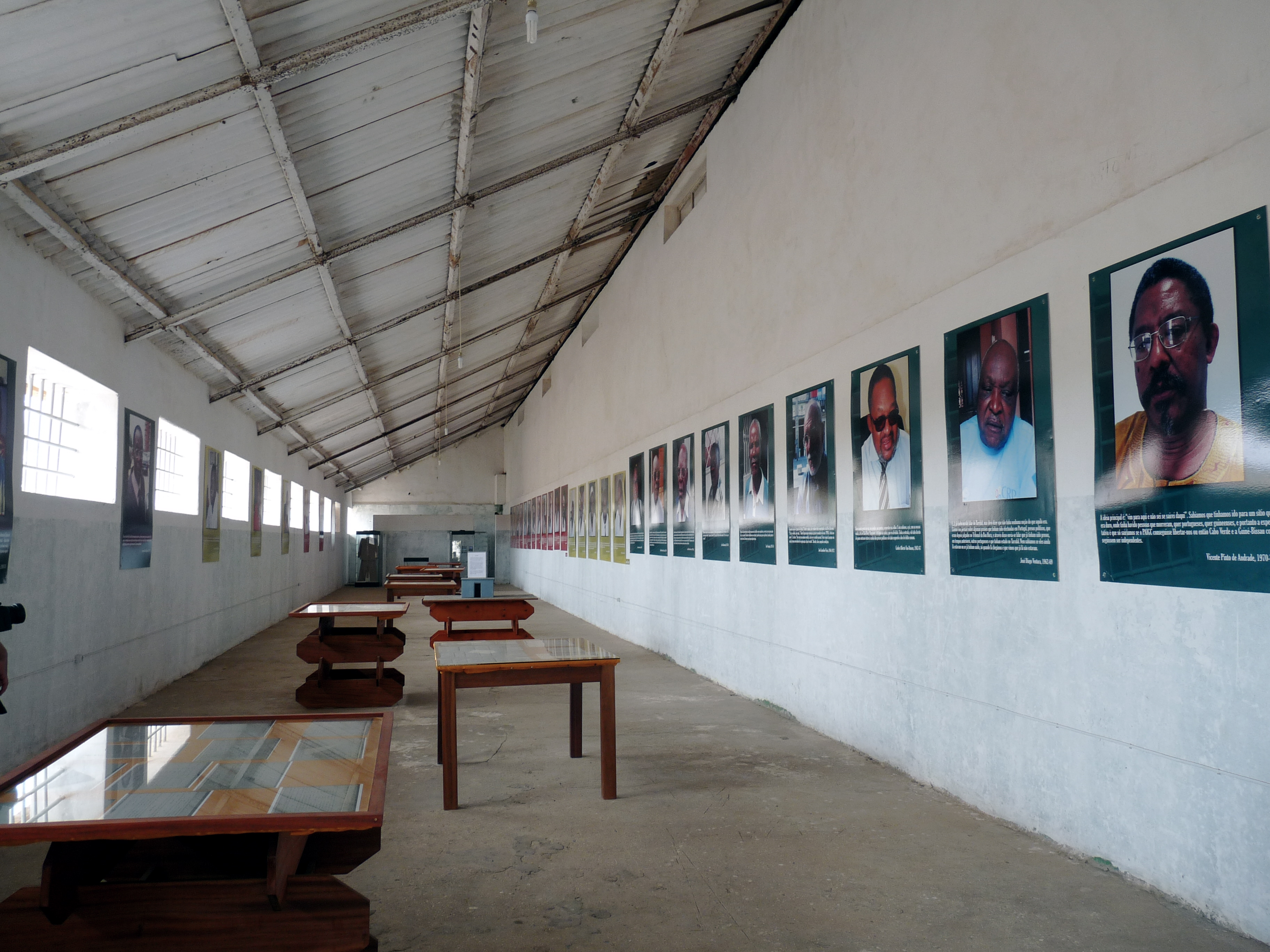 Antigo Campo de Concentração do Tarrafal, Ilha de Santiago - Cabo Verde / Old Concentration Camp in Tarrafal, Santiago Island - Cape Verde Este pavilhão serve agora para recordar o testemunho de alguns dos presos que por cá passaram.